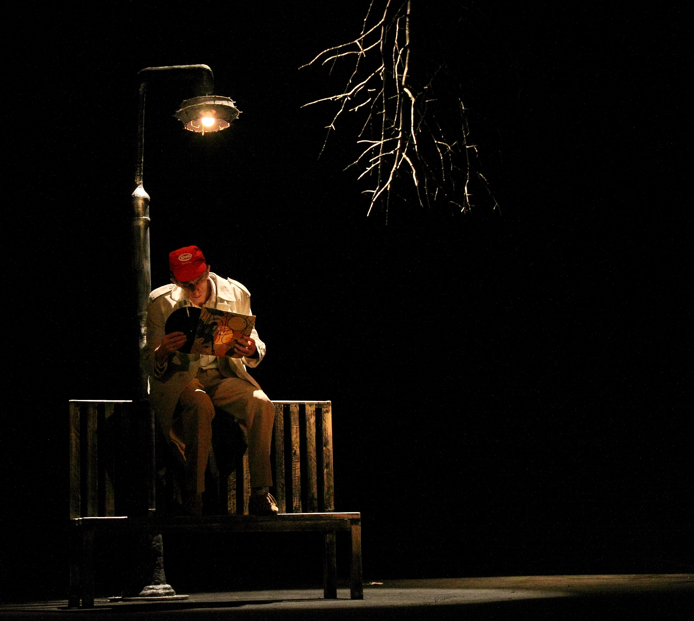 НАД ПРОПАСТЬЮ ВО РЖИ. Д. Сэлинджер режиссёр Евгений Тыщук